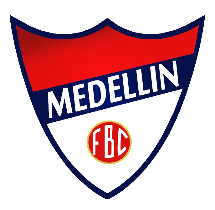 Medellín Football Club.